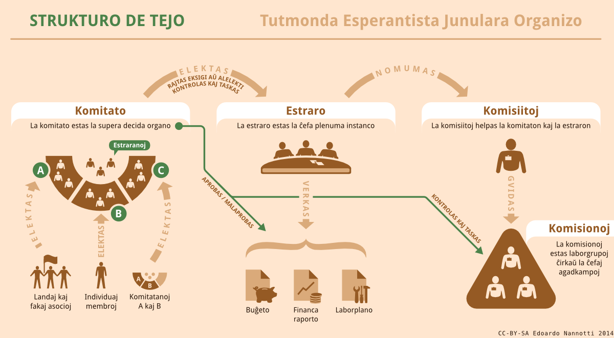 Diagramo kiu montras la strukturon de Tutmonda Esperantista Junulara Organizo